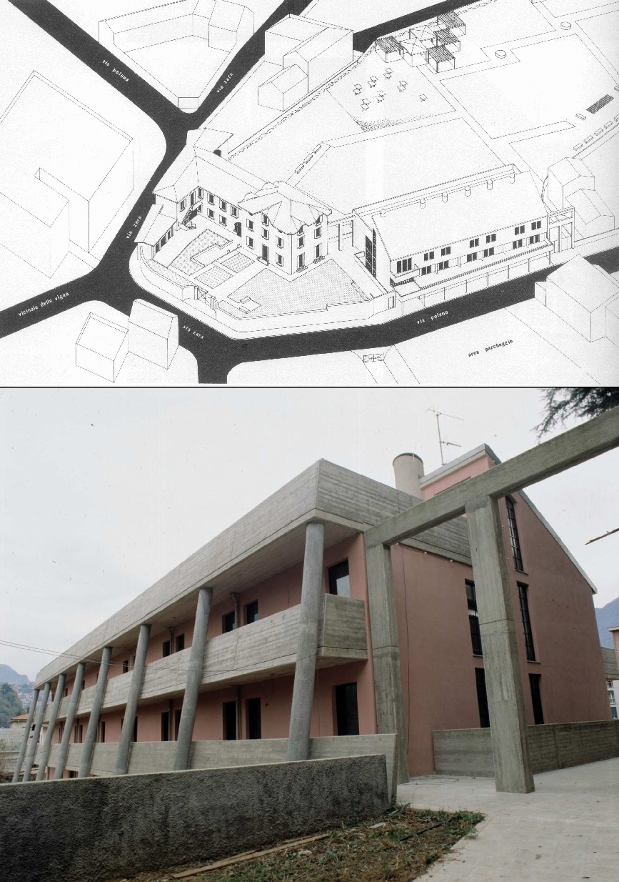 Villa Bellingardi, restauro e nuova costruzione integrativa, Comune di Como (1982-'90)